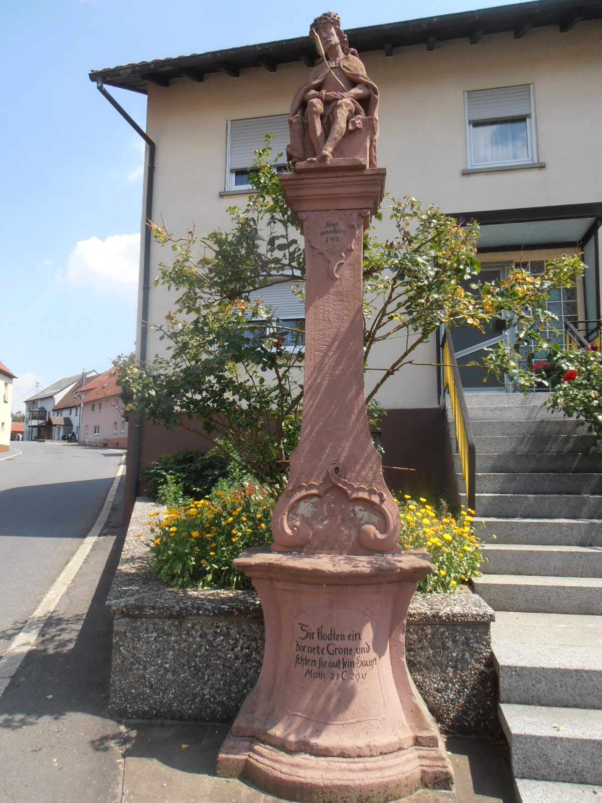 Skulptur in Berolzheim, aus rotem Sandstein, zeigt Jesus mit Dornenkrone